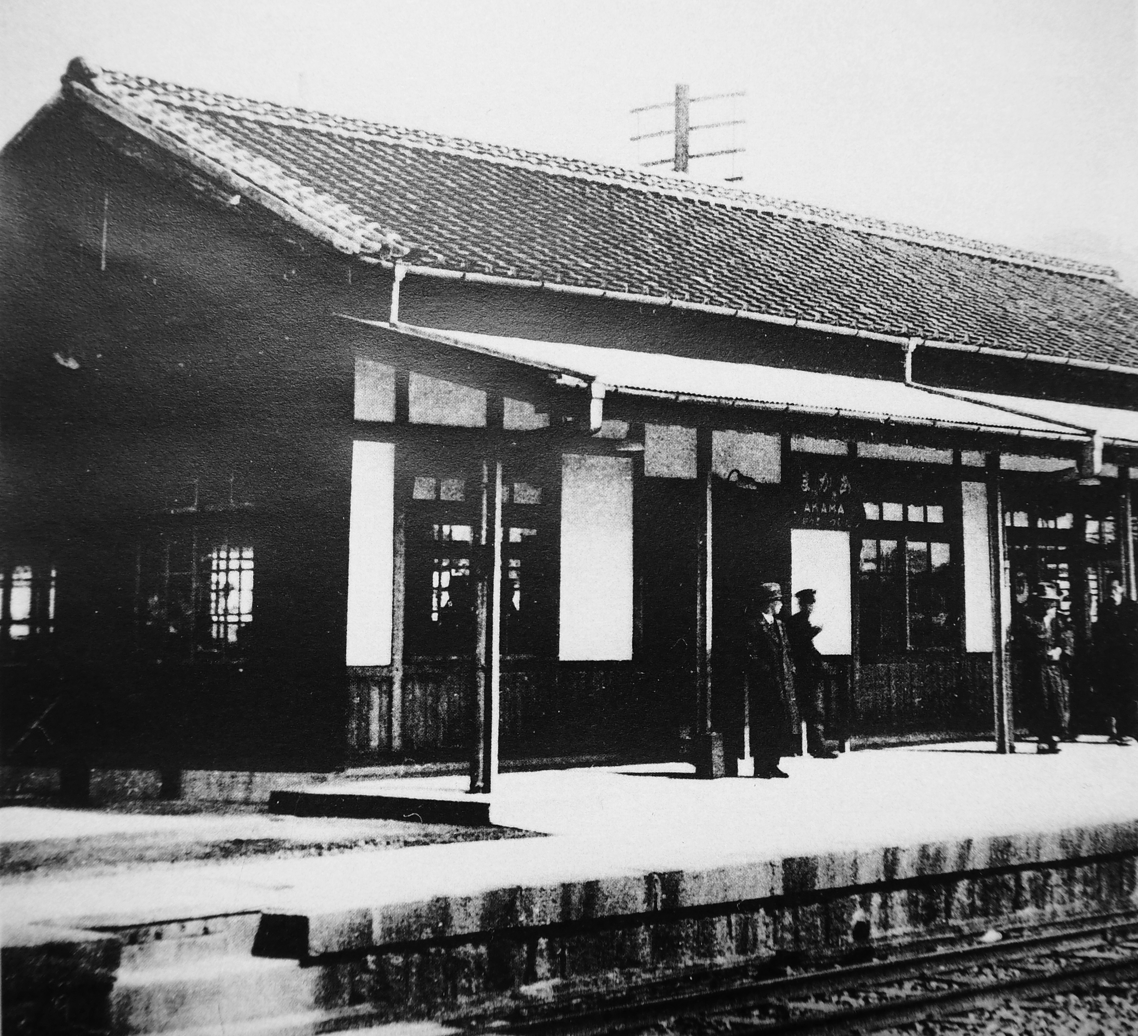 1939年（昭和14年）に撮影された赤間駅の写真。